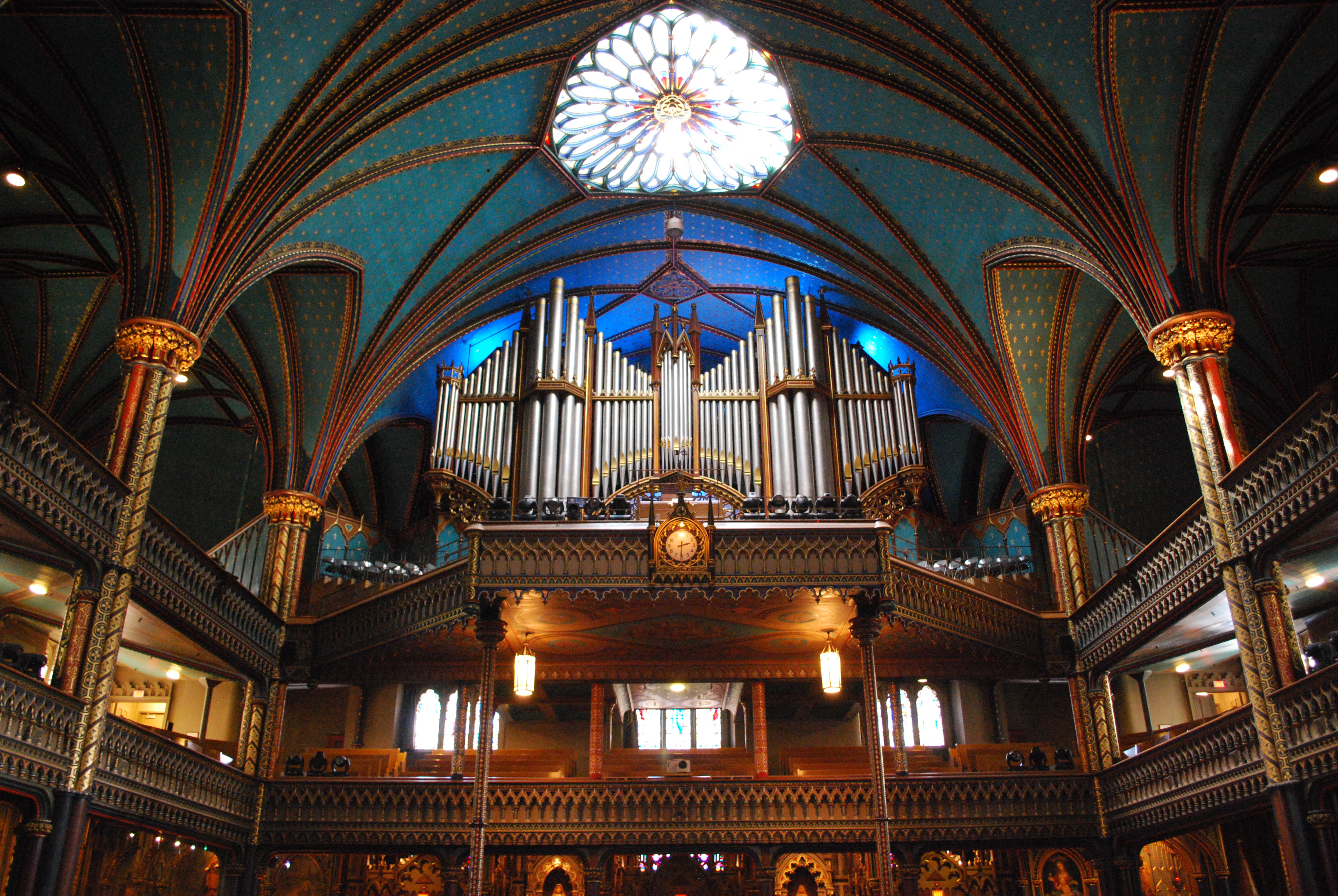 Orgue de la basilique Notre-Dame de Montréal.